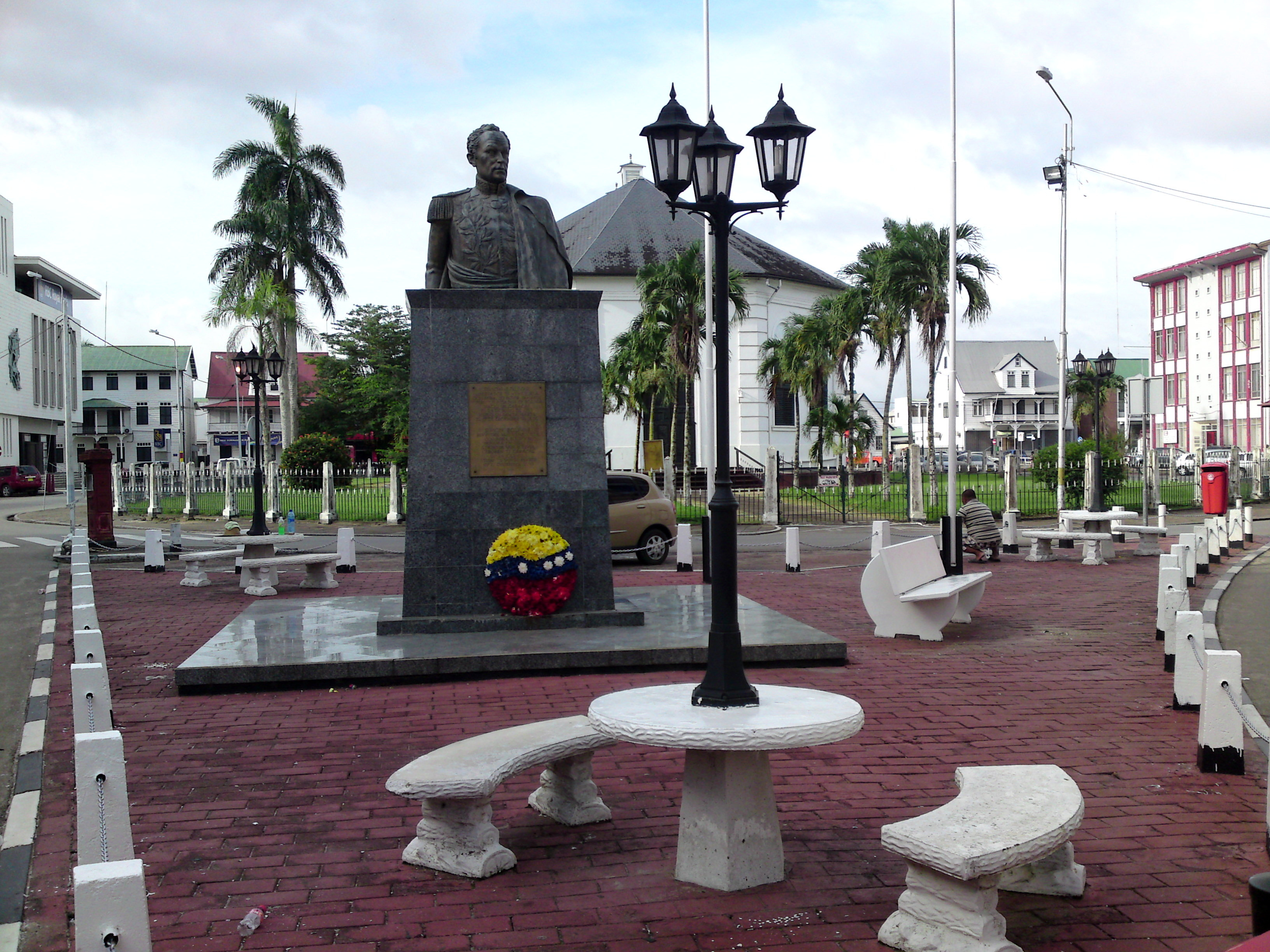 Paramaribo